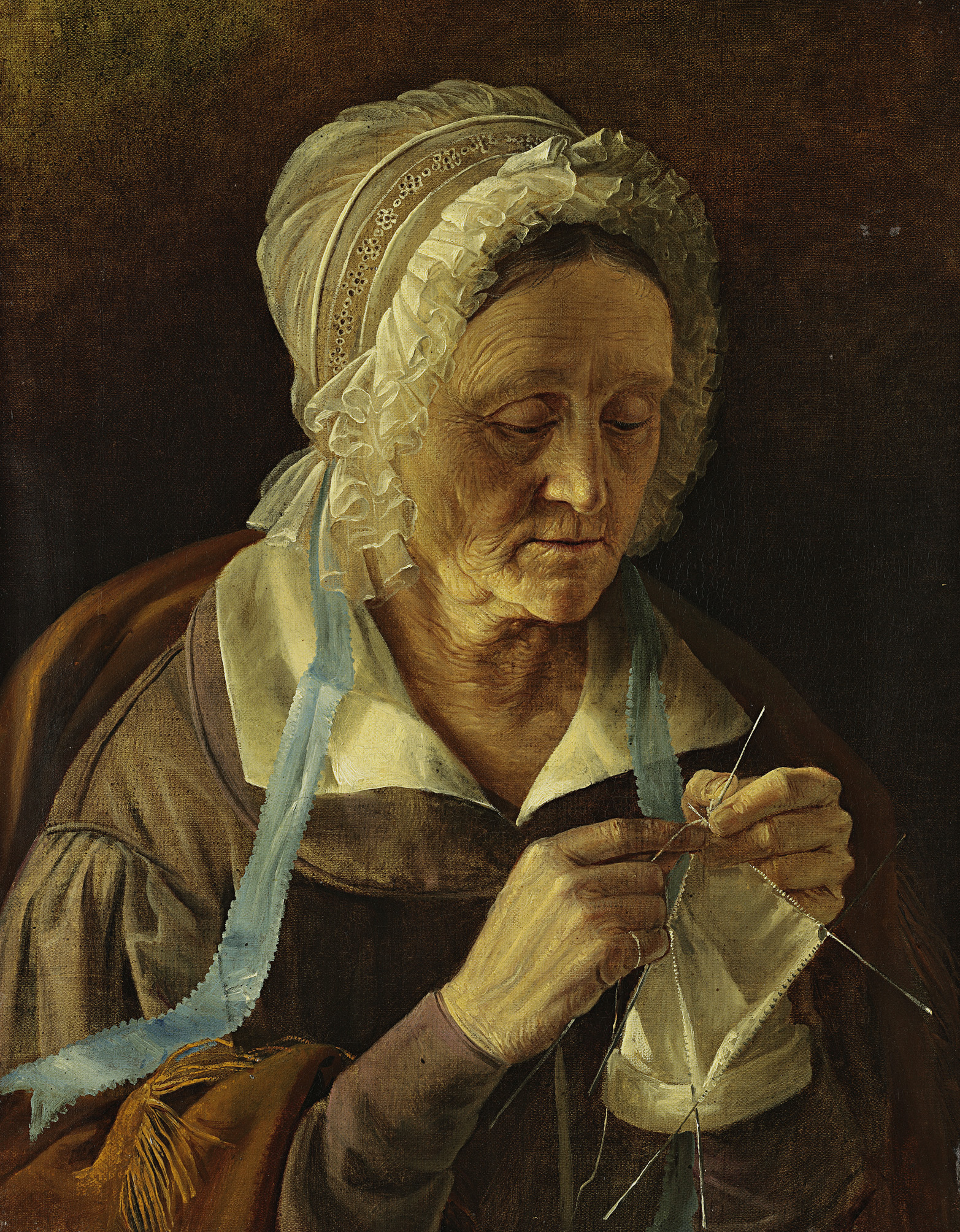 Старая, якая вяжа панчоху. 1838 г